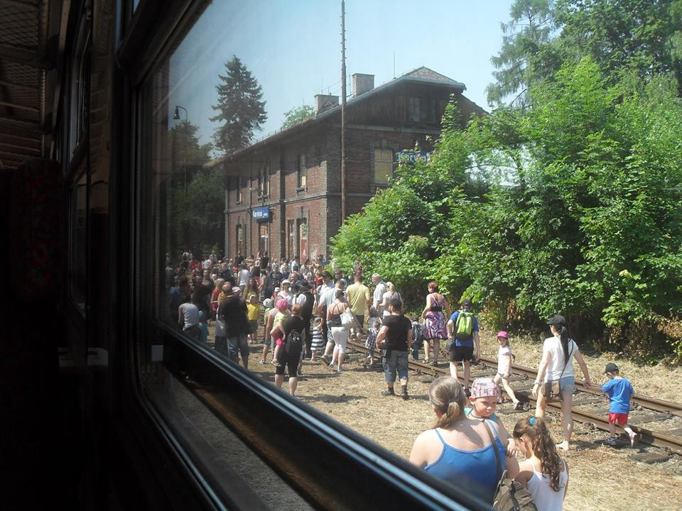 Nádraží Karviná město v centru města